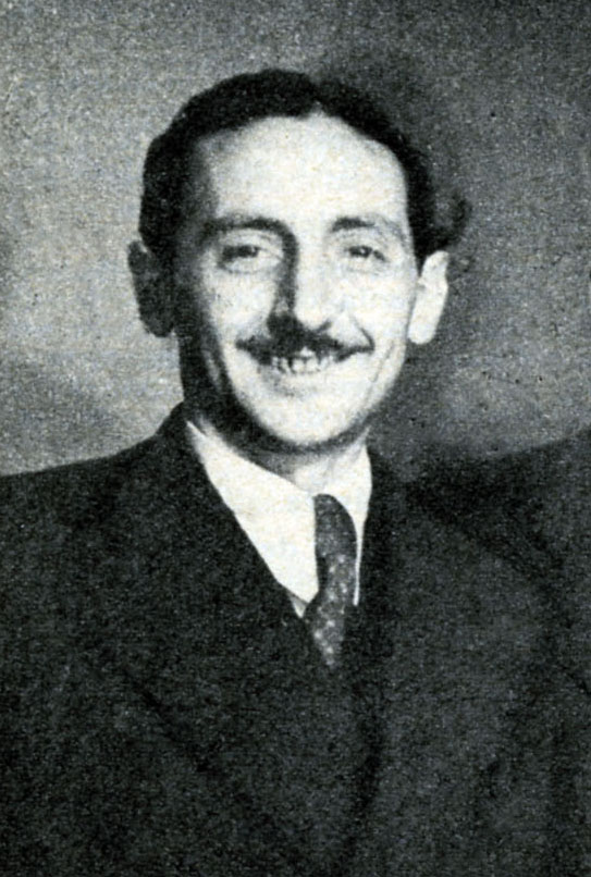 Nisa